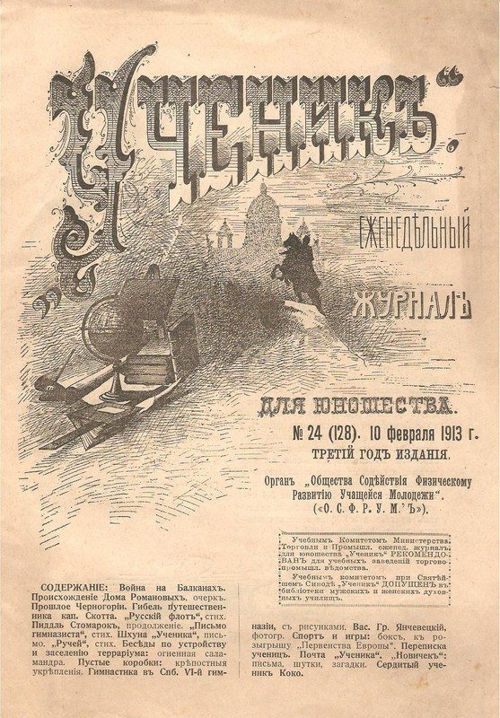 Ученик. Еженедельный журнал для юношества. №24 (128) под редакцией В. Янчевецкого. 10 февраля 1913 года. Третий год издания.